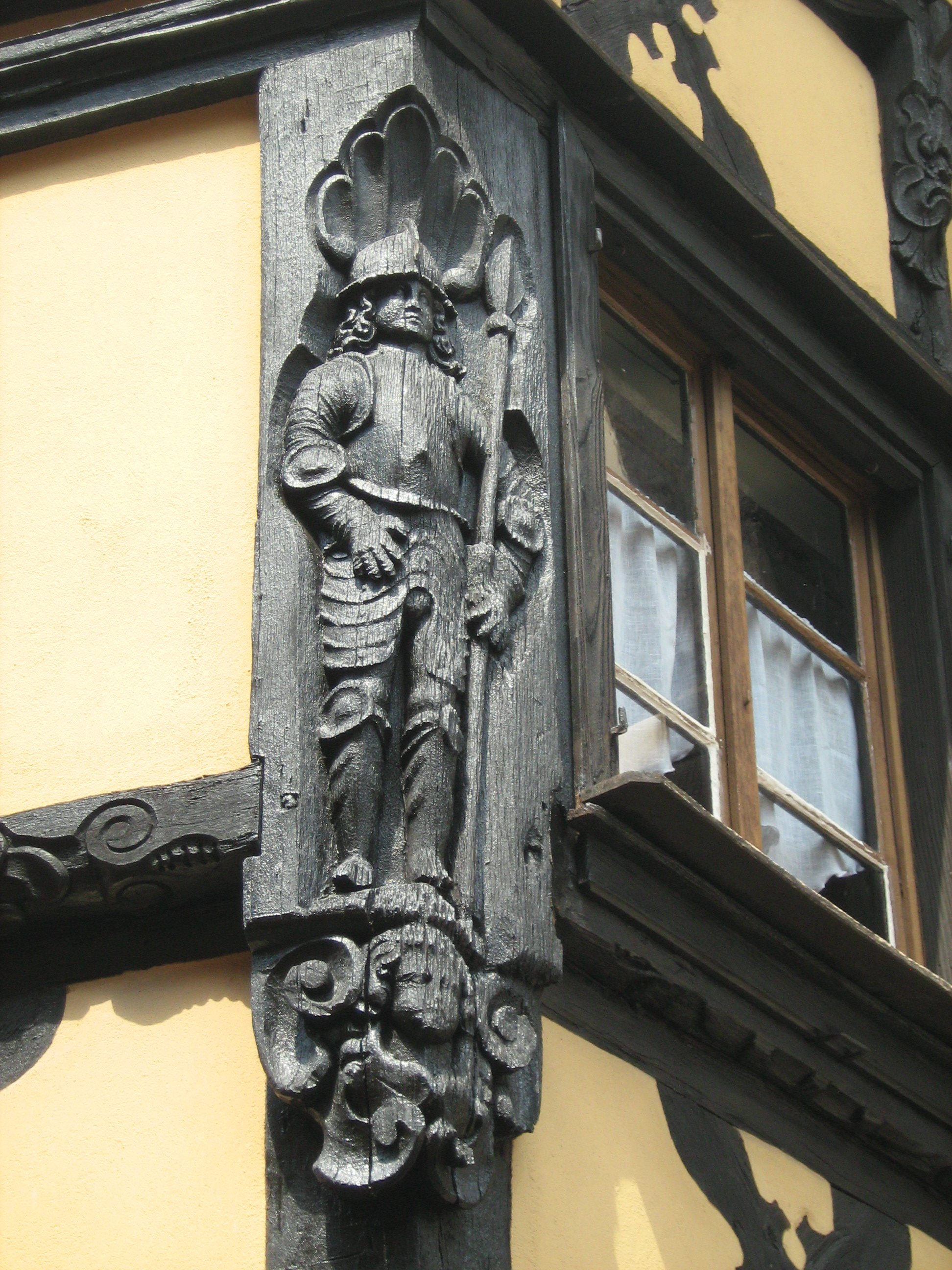 maison Siegler à Bouxwiller (67), année 1670